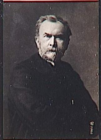 Foto del escultor francés Aristide Croisy.